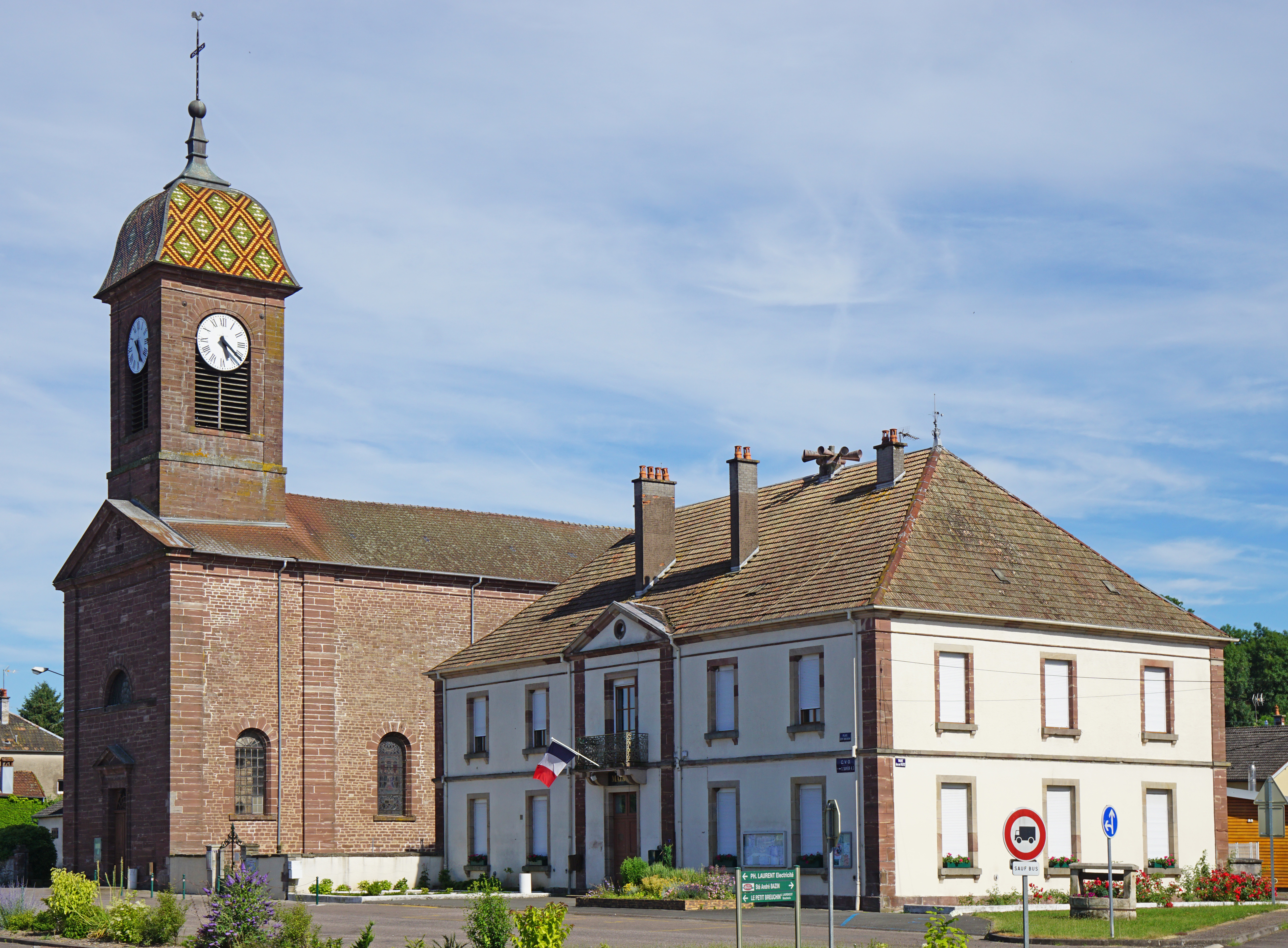 La mairie et l'église de Breuches.